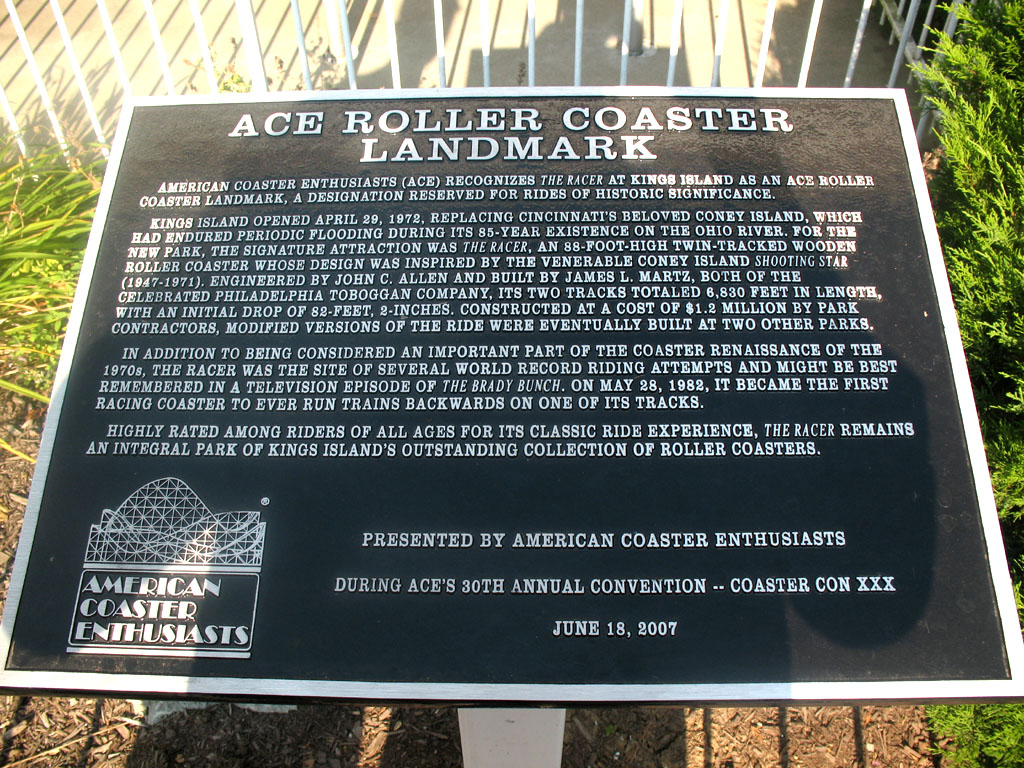 Racer , montagnes russes à Kings Island